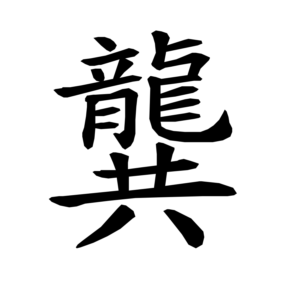 Гун фамилия